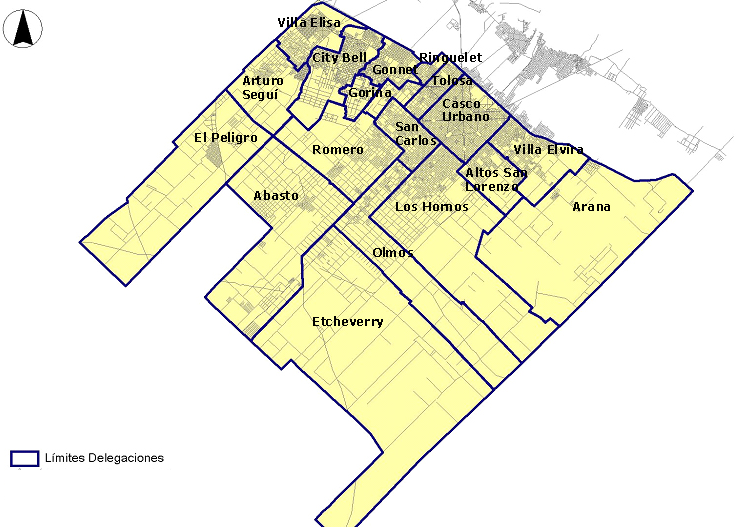 Partido de La Plata dividido en localidades